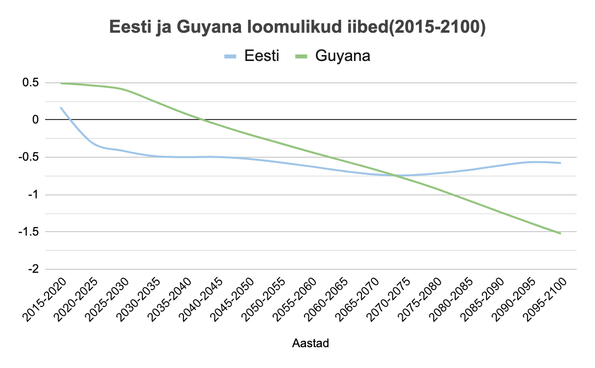 Eesti ja Guyana loomulikud iibed(2015-2100)